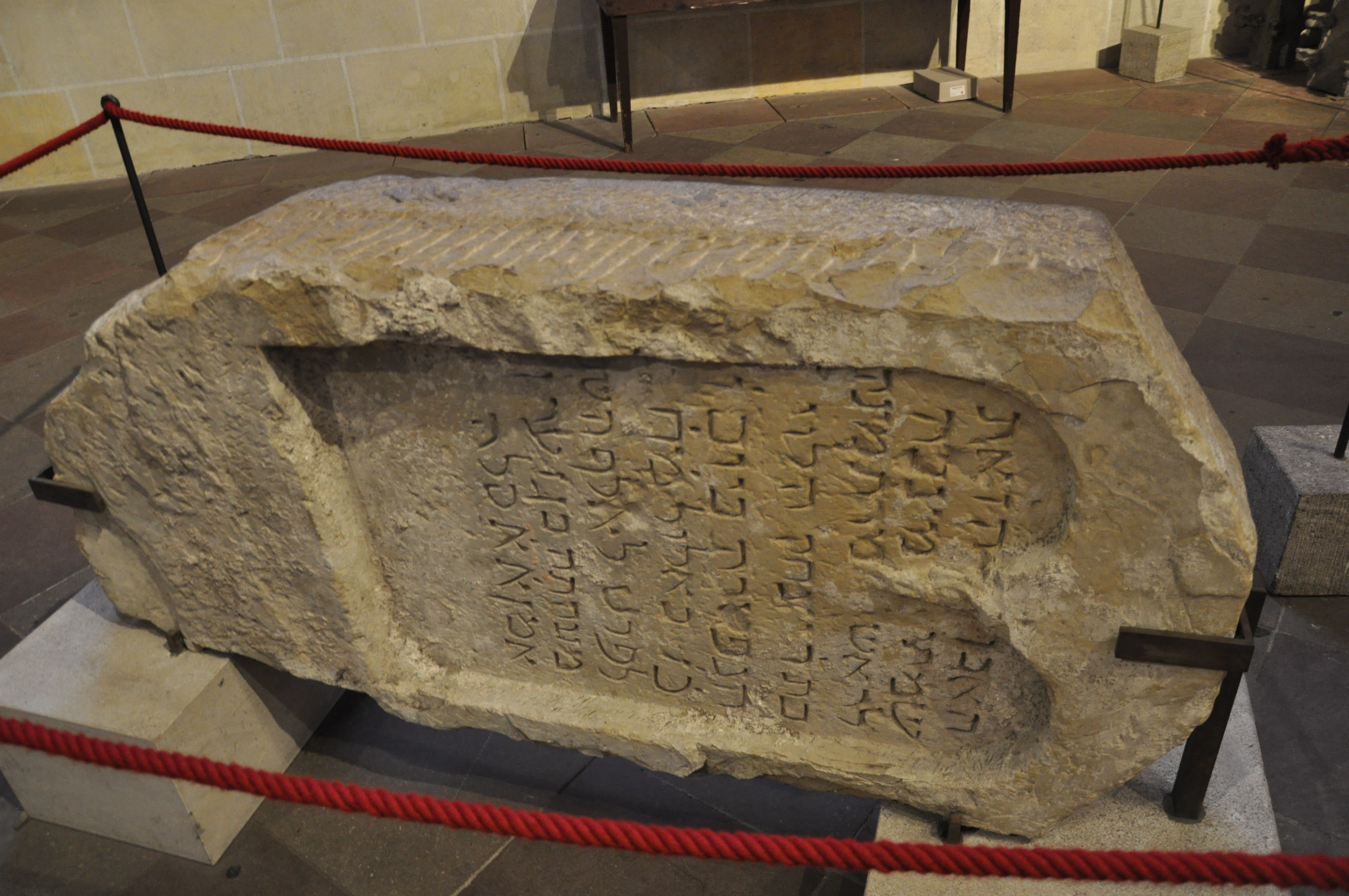 Ulm, Ulmer Münster, Jüdischer Grabstein aus dem 14. Jh.; 1377 dem Gedenken für den ersten Münsterpfleger umgewidmet (laut zweiter, deutscher Inschrift)